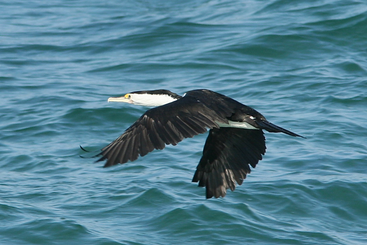 Pied Cormorant, Phalacrocorax varius.